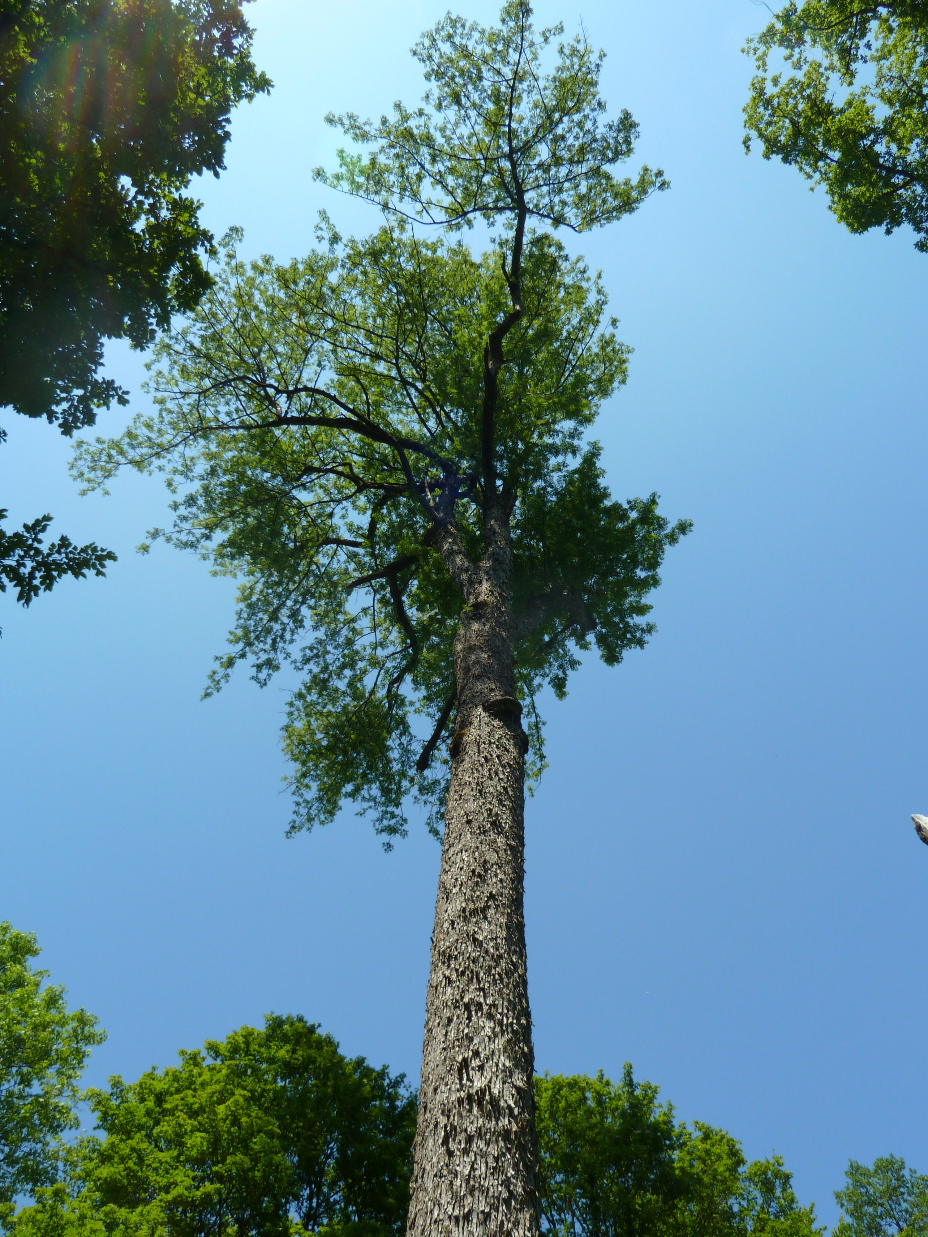 Commercy Le Cormier (arbre remarquable)